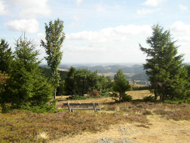 Blick vom Osterkopf (709 Meter üNN) in Willingen (Upland) in Richtung Nord-Osten (Kasseler Berge); Heidebereich im Vordergrund im Naturschutzgebiet „Osterkopf bei Usseln“